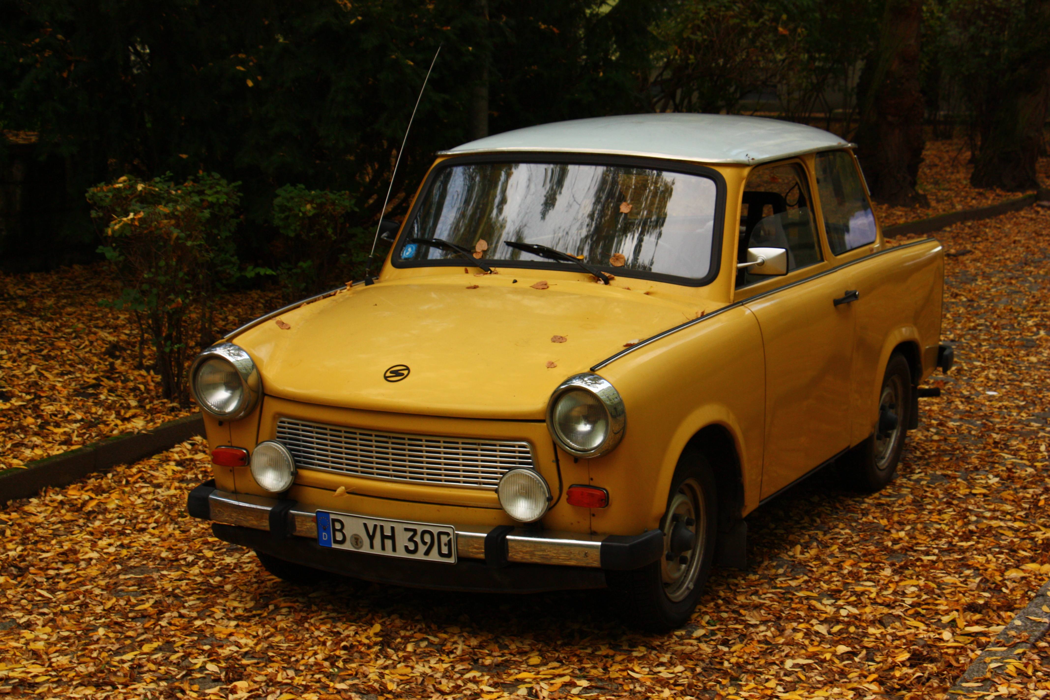 Verchromte Lampenringe und rechter Außenspiegel als zeitgenössisches Zubehör. Ohne Glashubdach, ansonsten Vollausstattung.